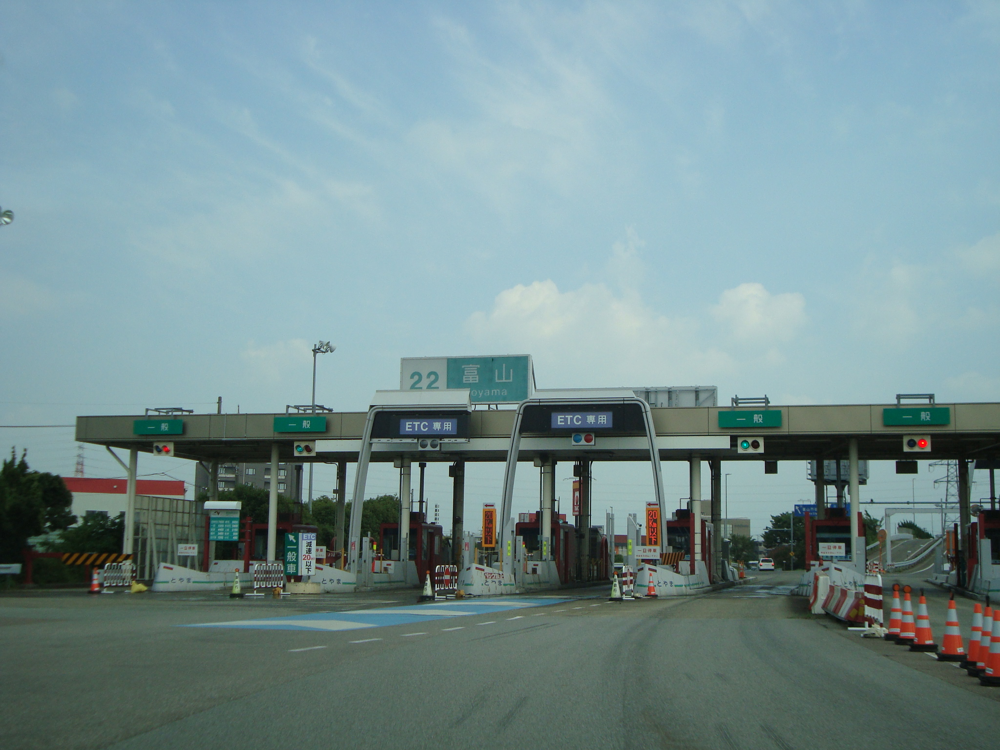 北陸自動車道 富山インターチェンジ 料金所